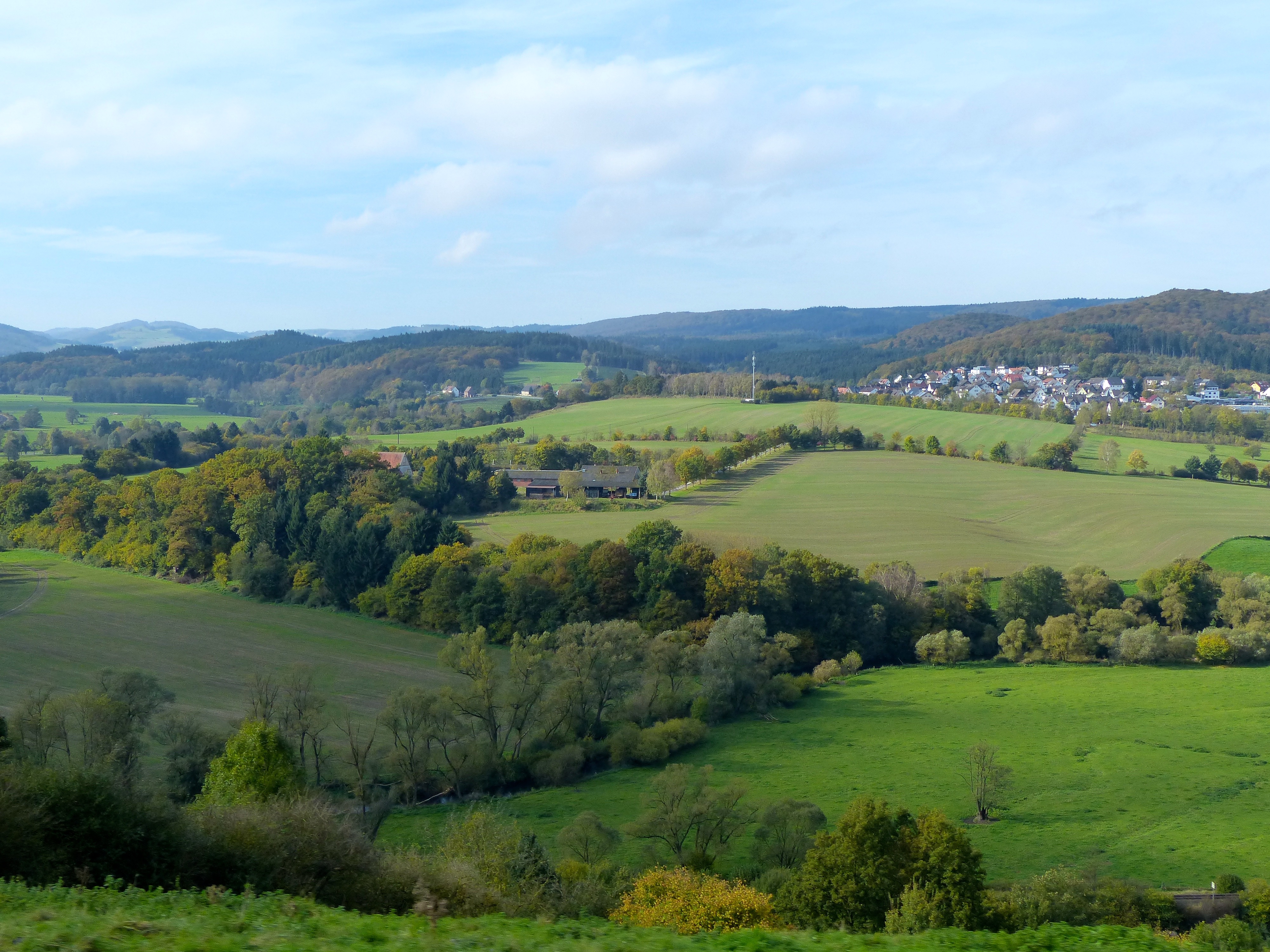 Blick nach Norden ins Diemeltal bei Marsberg; Flussaue im Bildvordergrund gehört zum NSG Unteres Diemeltal; während die Hangbereiche im Hintergrund zum Landschaftsschutzgiet Diemeltalflanken um Niedermarsberg gehört; Berge hinten gehören zum Landschaftsschutzgebiet Bredelarer Kammer / Fürstenberger Wald; Hauser gehören zu Niedermarsberg